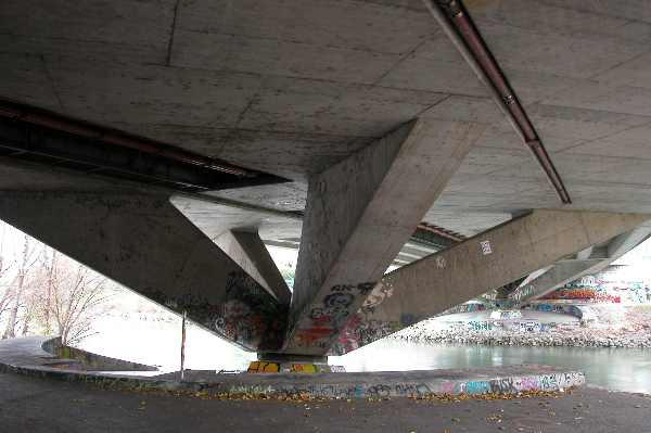 Roßauer Brücke in Wien